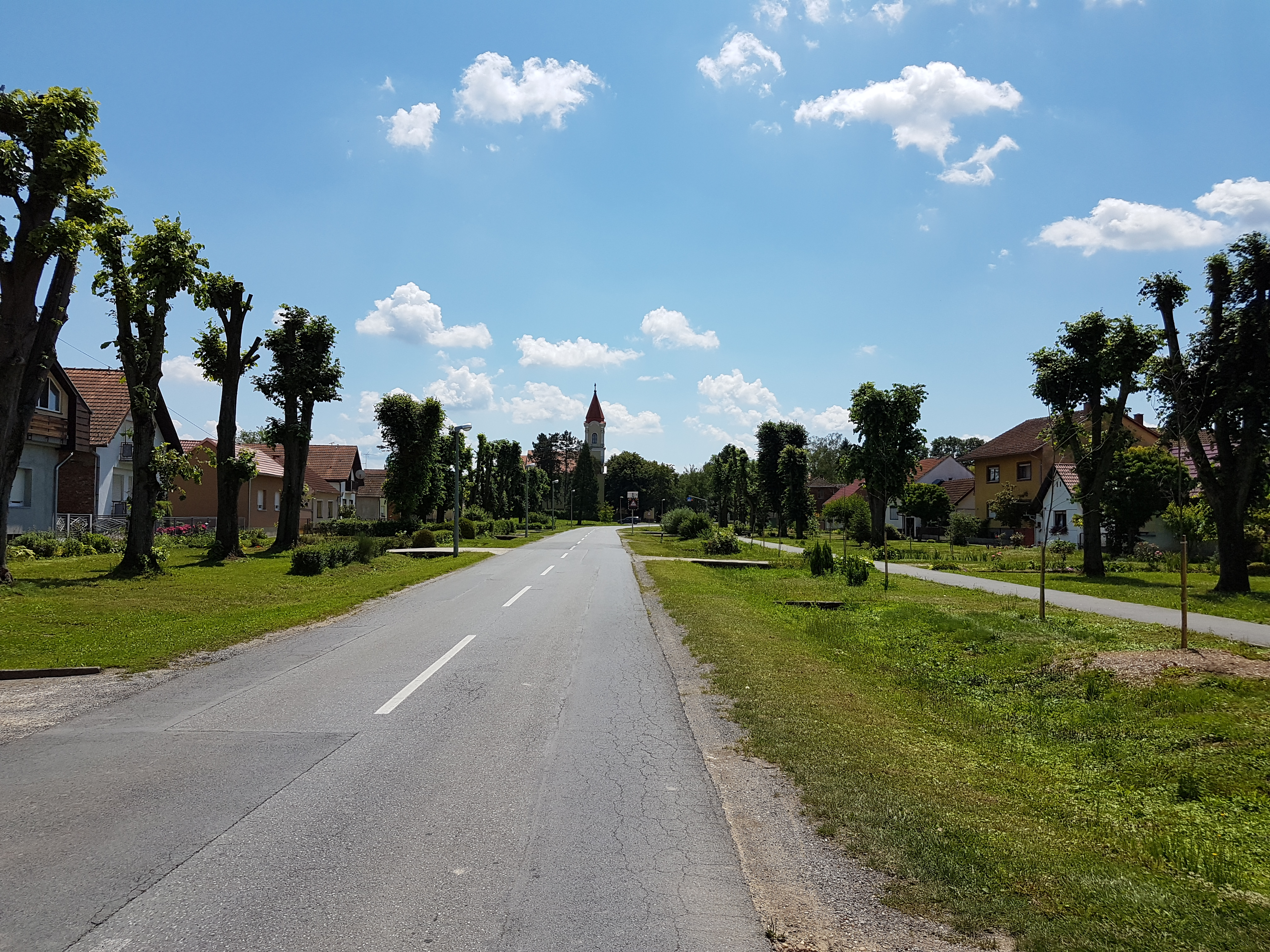 Ulaz u Špišić Bukovicu i pogled na crkvu sv. Ivana Krstitelja.